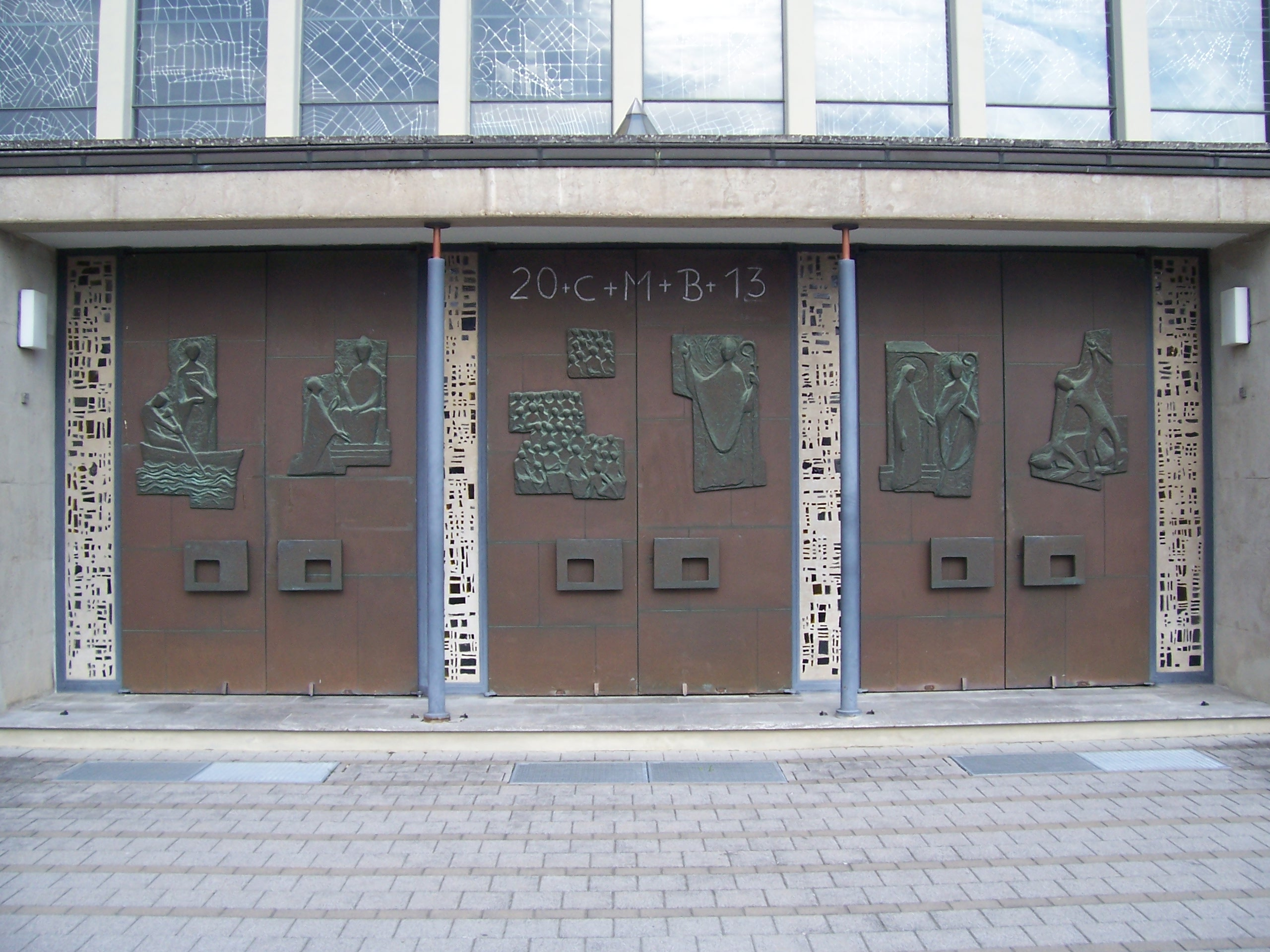 Haupteingang von St. Bonifatius (Tauberbischofsheim). Die Bronzereliefs sind von Lukas Gastl und zeigen Darstellungen aus dem Leben des heiligen Bonifatius.